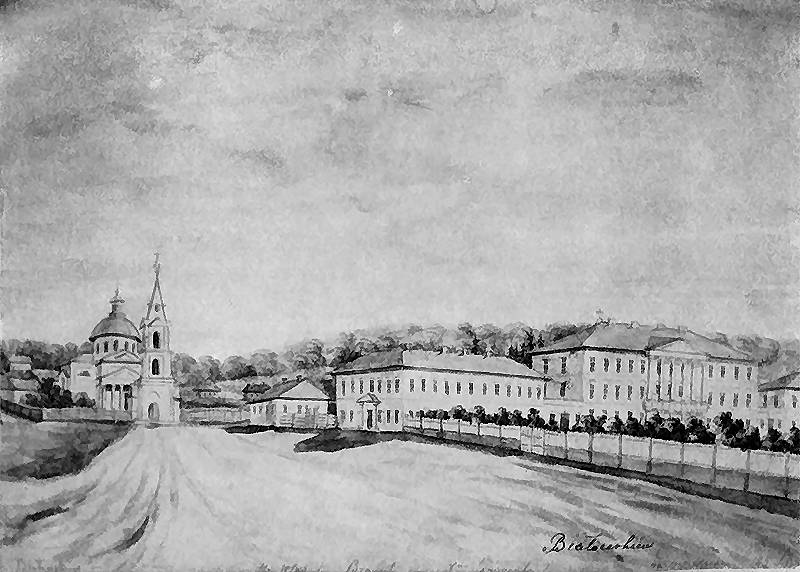 BIAŁA CERKIEW Cerkiew i gimnazjum. Widok cerkwi i zespołu budynków gimnazjalnych od strony placu. Cerkiew na planie krzyża greckiego z kopułą z latarnią na skrzyżowaniu naw i portykiem kolumnowym w fasadzie; na osi cerkwi trzykondygnacjowa dzwonnica-brama; z prawej strony trzykondygnacjowy budynek główny gimnazjum z portykiem kolumnowym oraz dwukondygnacjowe oficyny połączone z korpusem parterowymi łącznikami. Dat.: 25 Sier. Napis: Białocerkiew - Cerkiew; Hr. Władysław Branicki żona X-na Sapieżanka; Białocerkiew; Gimnazjum; napis na podkładzie: G. Kijowska. Biała Cerkiew, pałac i kościół. 1870-1874. Rys. ołówkiem podmalowany akwarelą. 19,9 x 26,9 cm. Muzeum Narodowe, Kraków. III-r.a. 2836. (Teka Ukraina).